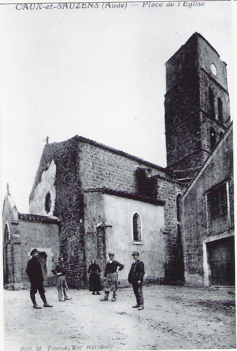 France, Aude (11), Caux-et-Sauzens, église